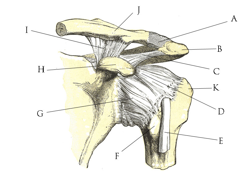 Skulderled.